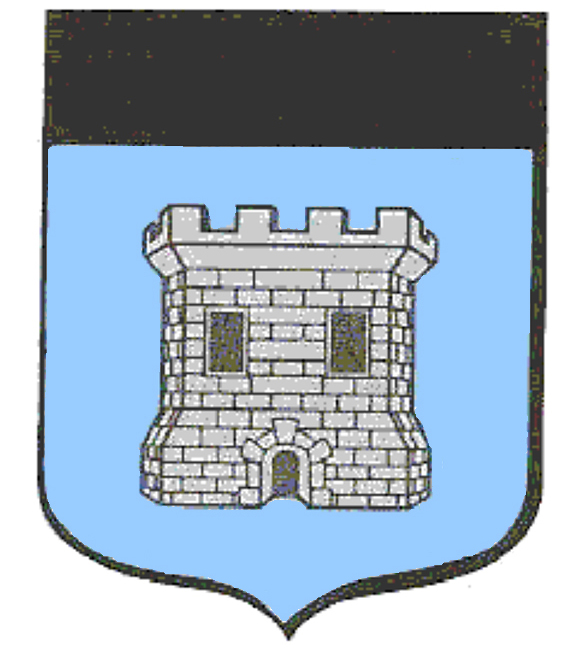 Blason de Castelnau d'Auzan